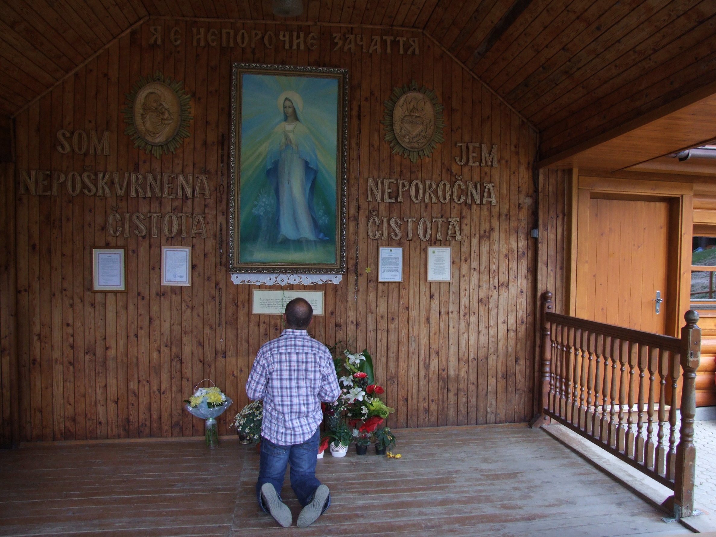 Litmanová. Obraz Matki Boskiej Litmanowskiej